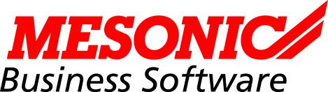 Firmenlogo MESONIC Business Software.